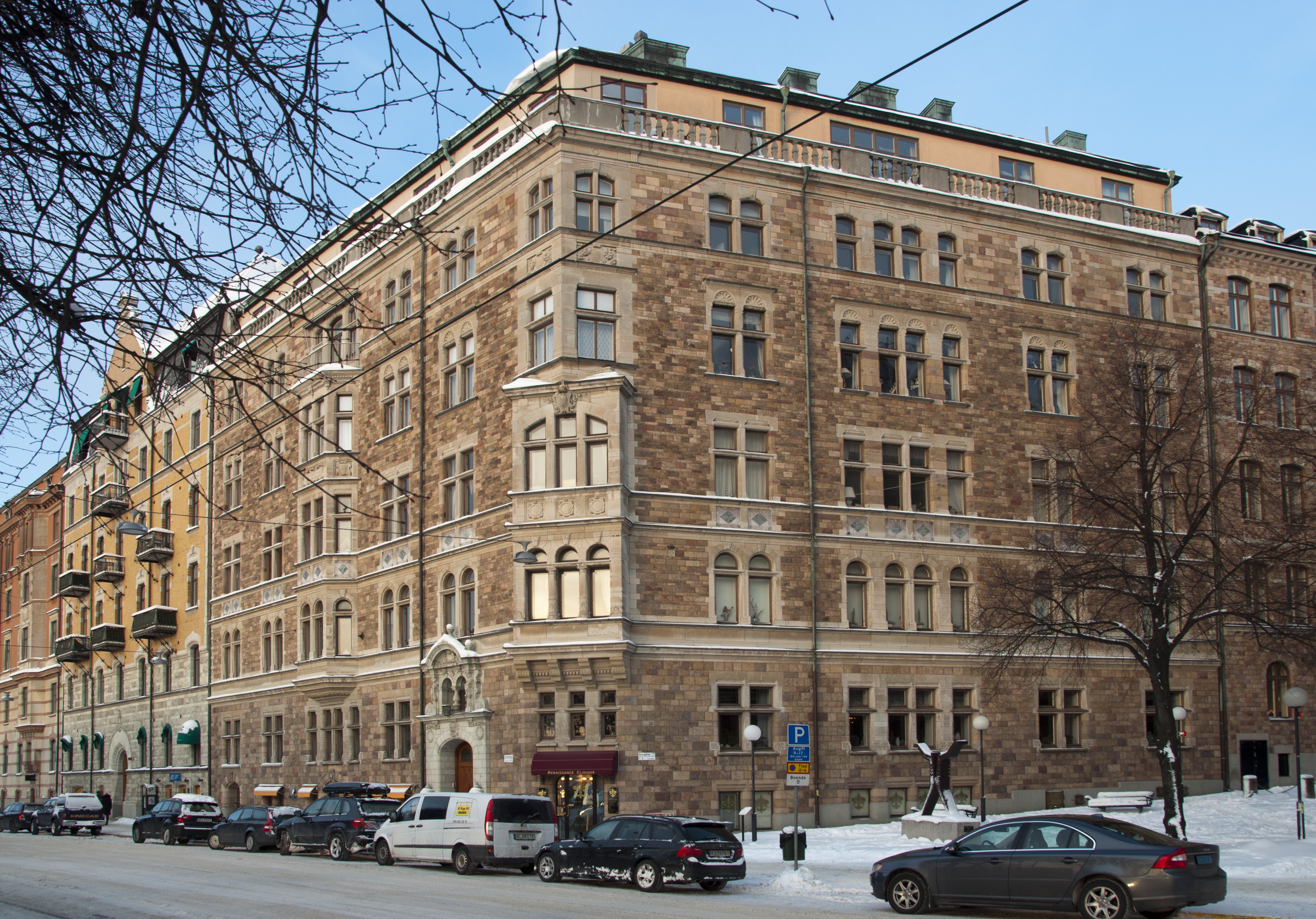 Strandvägen 15. Byggnadsår 1896, arkitekt Johan Laurentz, byggherre och byggmästare P A Wersén